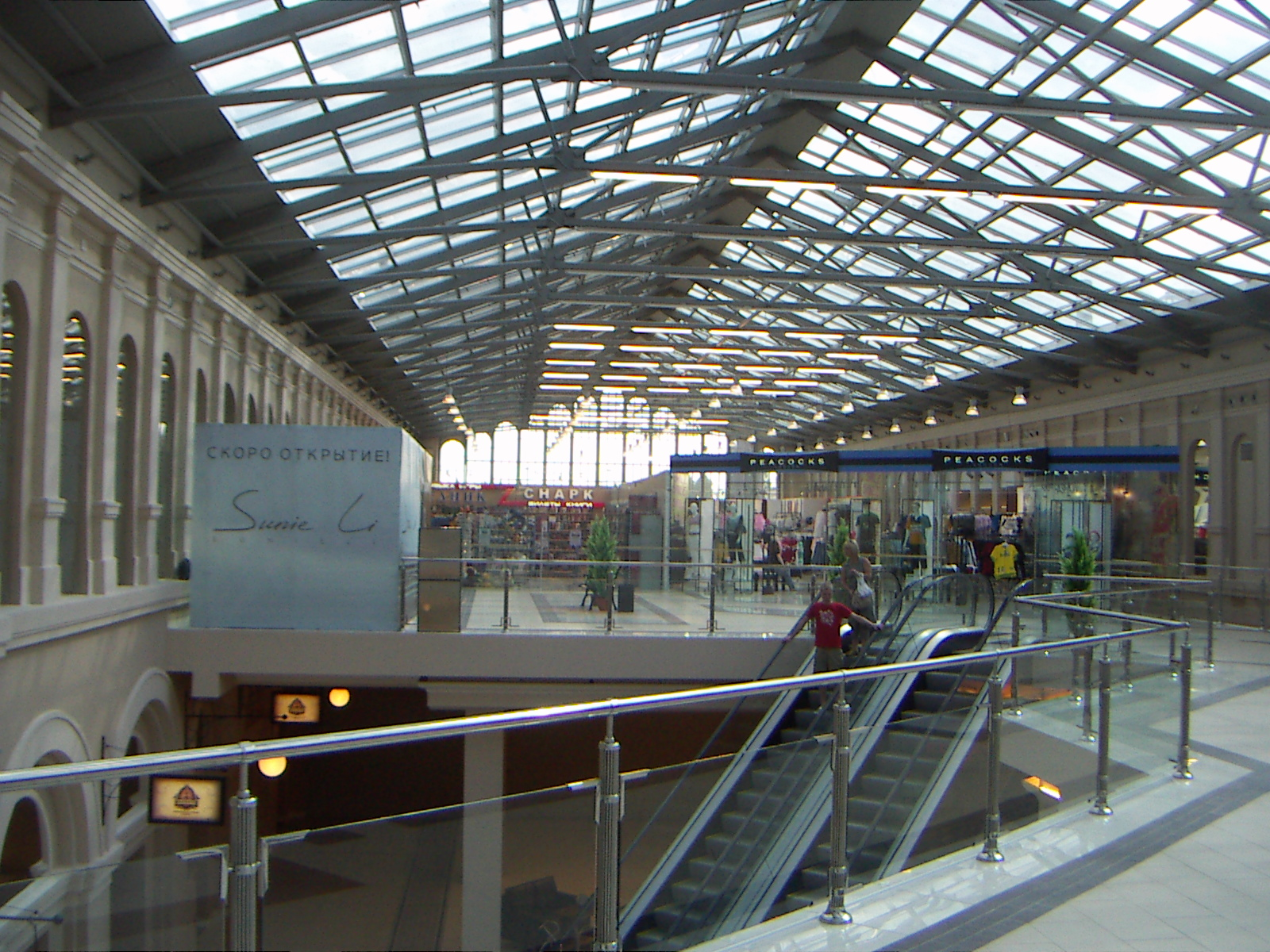 Varshavsky Terminal in S-Petersburg